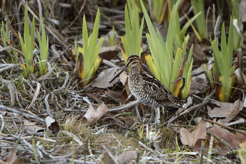 Wilson's Snipe Gallinago delicata, San Luis Obispo, California.